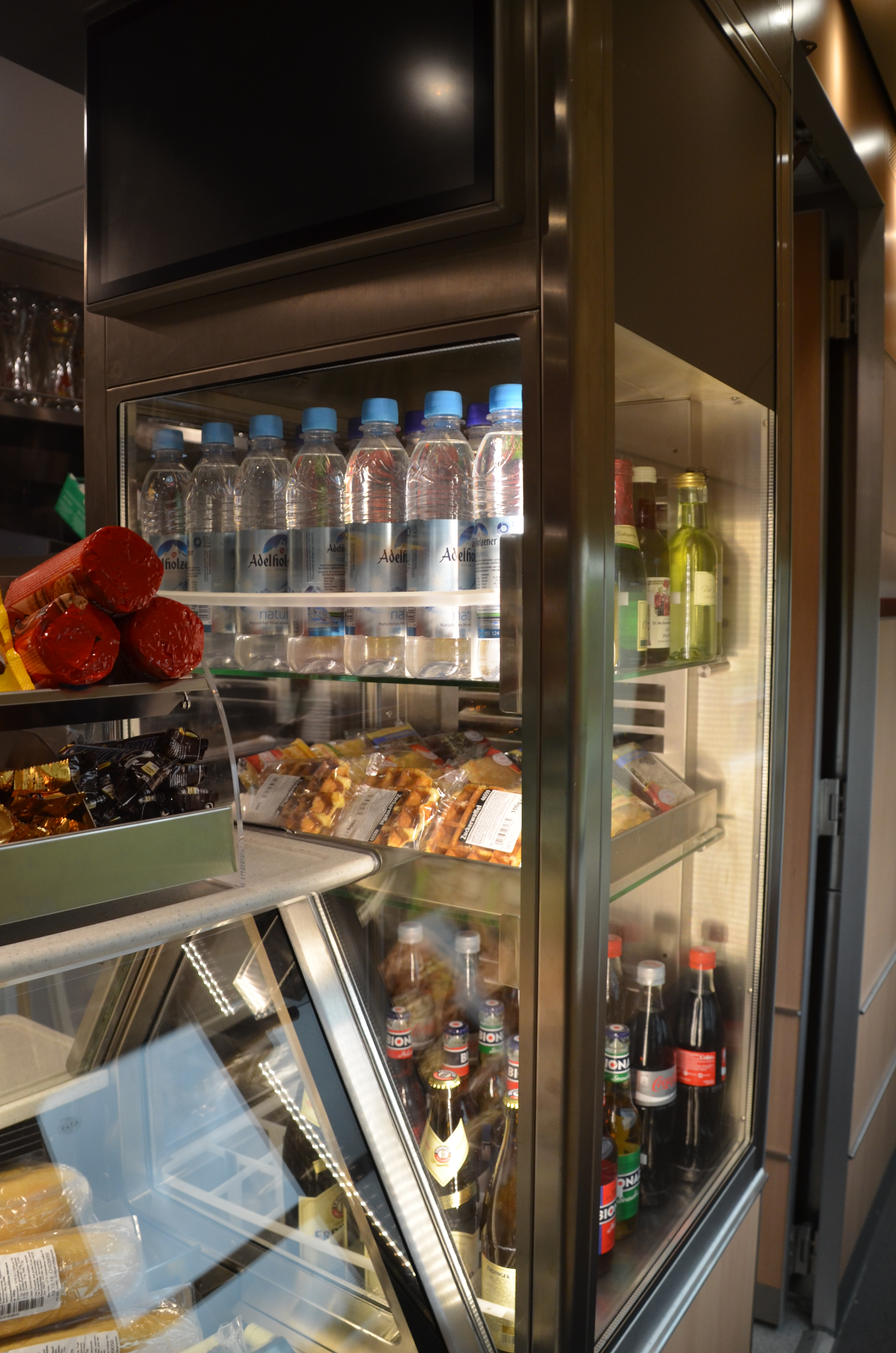 ICE 4 Probefahrt